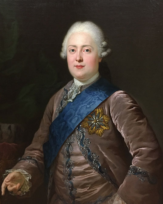 Provenienz: Herr Brunner, Winterthur; Frau Trotmann-Brunner, Winterthur; Galerie Fischer Auktionen, Luzern, am 8. September 1924, Los Nr. 127; Herr Bruno Sträuli, Winterthur; Sotheby's Auktionen, London, am 10. Juli 2003, Los Nr. 203 (Schätzpreis: GBP 10.000 bis 15.000); Ersteigert für GBP 24.000, damals über CHF 42.000, durch den Konservator des Museums Oskar Reinhart am Stadtgarten, Winterthur, für das Museum Briner und Kern, Winterthur (der Louvre in Paris soll ebenfalls Interesse an dem Gemälde gezeigt haben).